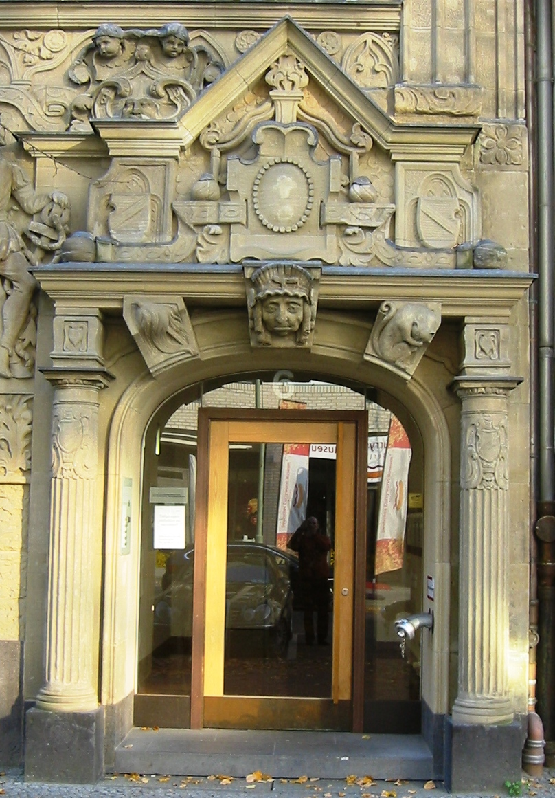 Eingangsportal des denkmalgeschützten Gebäudes "Hotel Roder Adler" in der Schützenstraße 6 und 6A in Berlin-Mitte